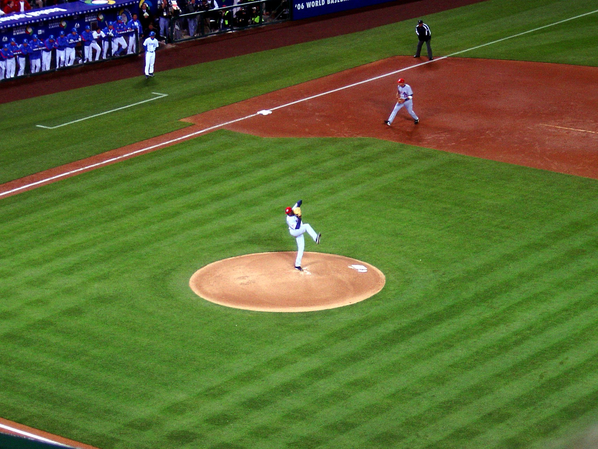 Dontrelle Willis, World Baseball Classic, Angel Stadium, Anaheim, USA